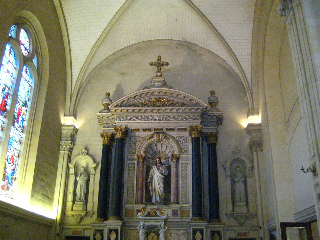 Retable de la chapelle de la Visitation de Caen